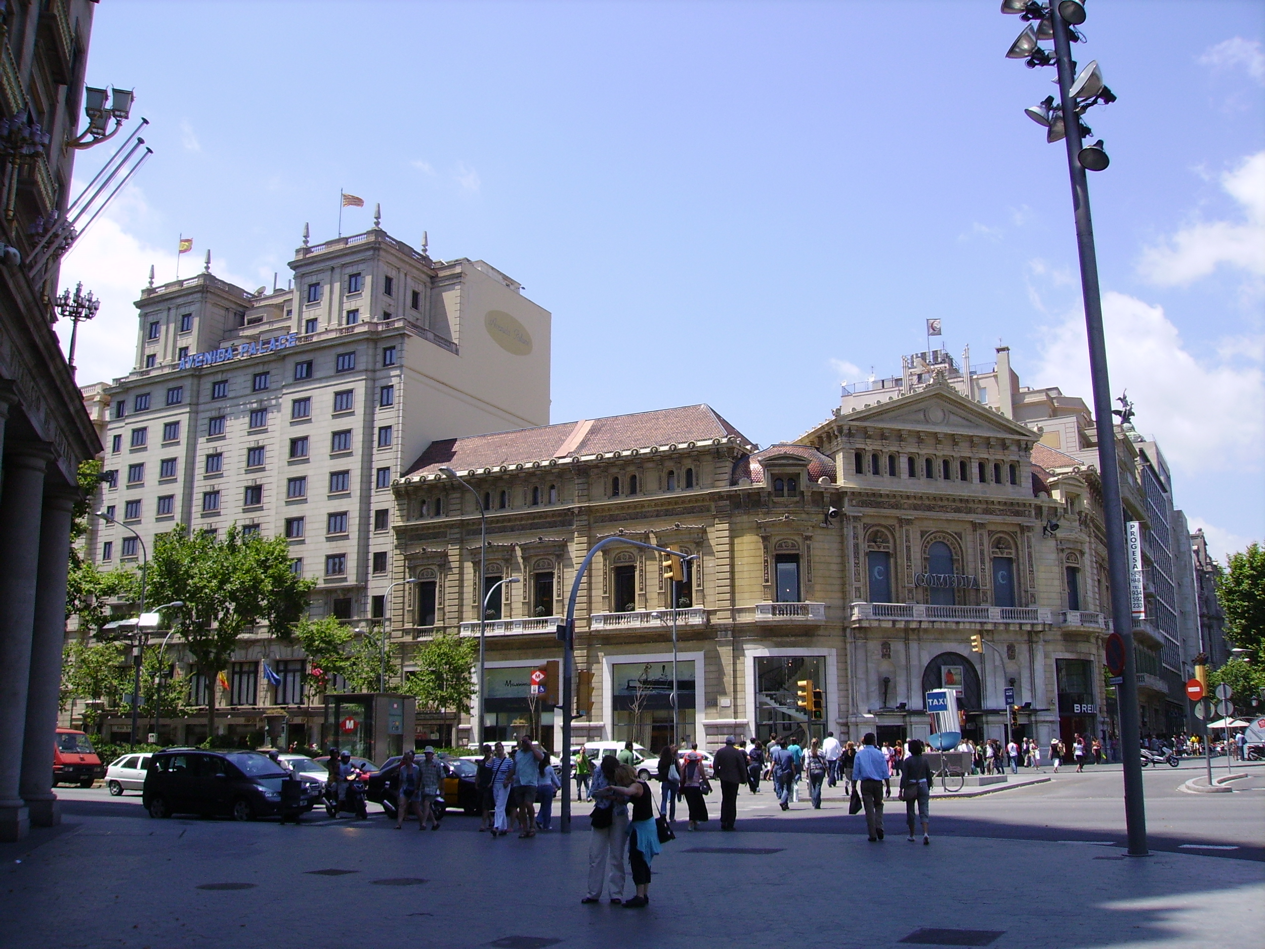 Passeig de Gràcia-Gran Via, Cinema Comedia i Hotel Avenida Palace, Barcelona,Catalunya